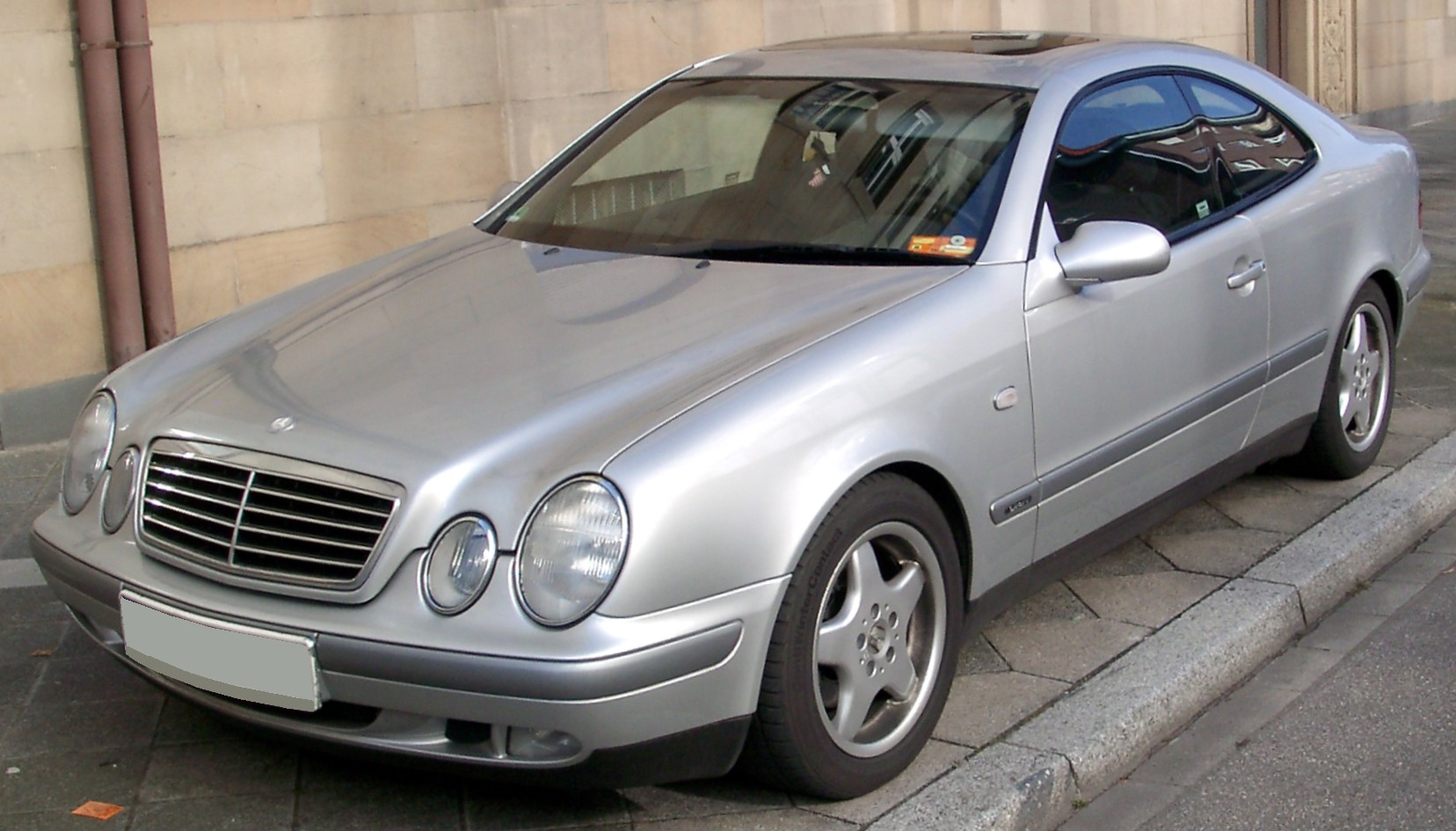 Mercedes-Benz W208 (Mercedes CLK)